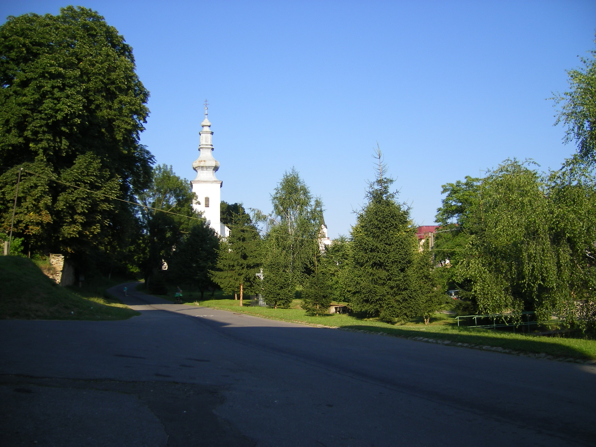 Nižný Hrušokv (okres Vranov nad Topľou)